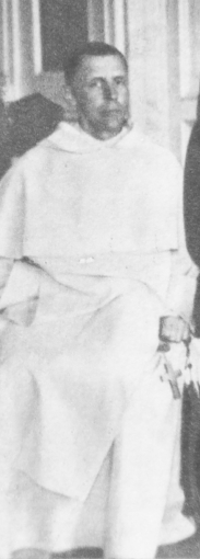 bł. o. Michał Czartoryski OP (właść. Jan Franciszek Czartoryski)